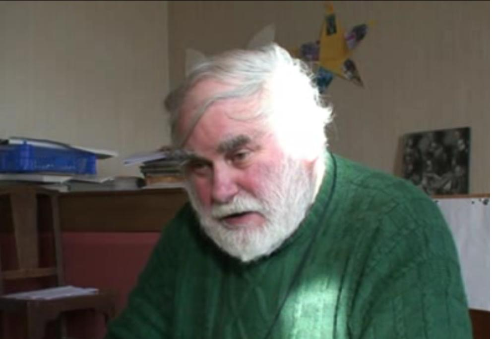 Yann Talbot, beleg, kelenner, troour brezhonek